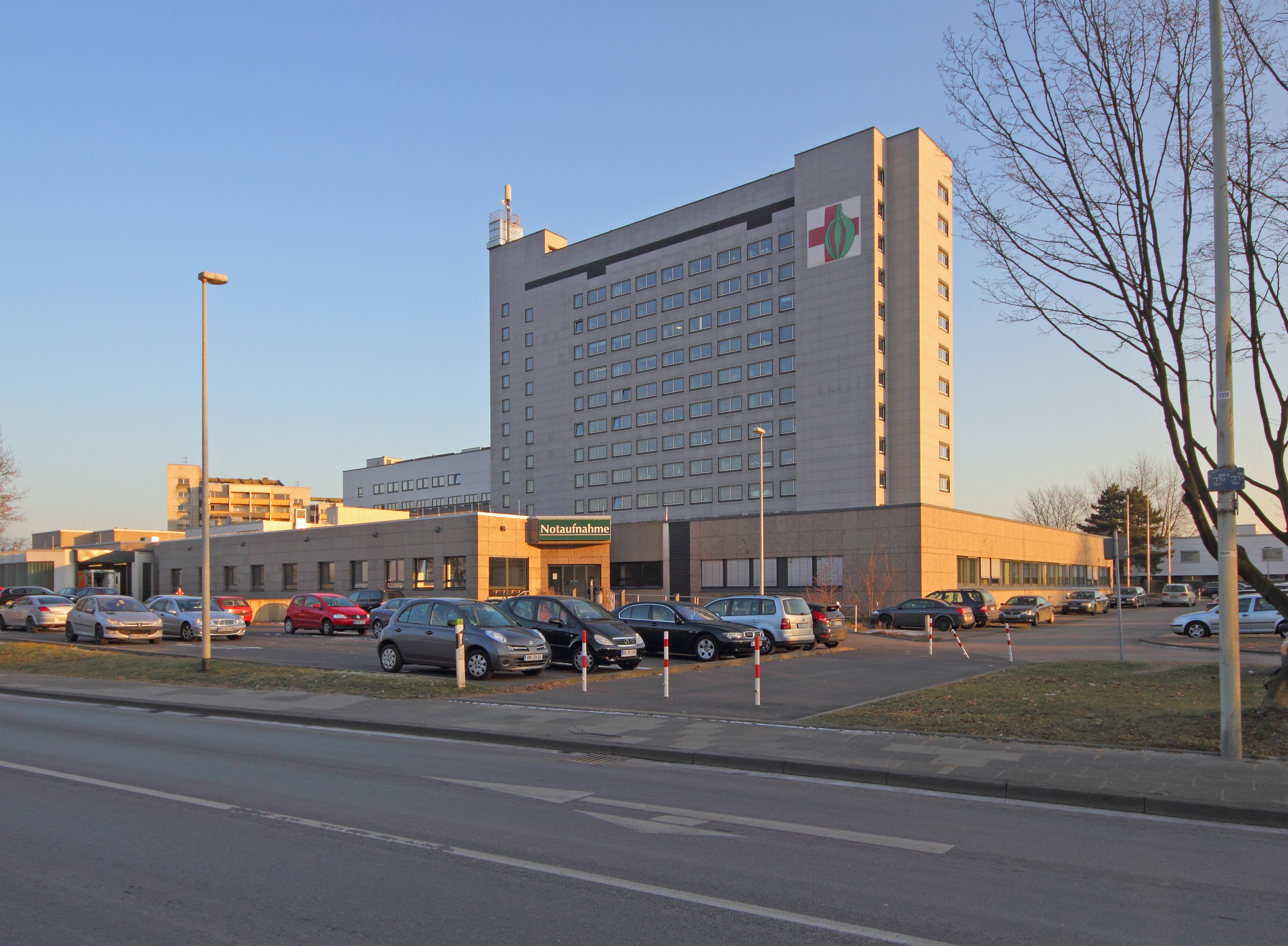 St.-Katharinen-Krankenhaus in Frechen-Hücheln